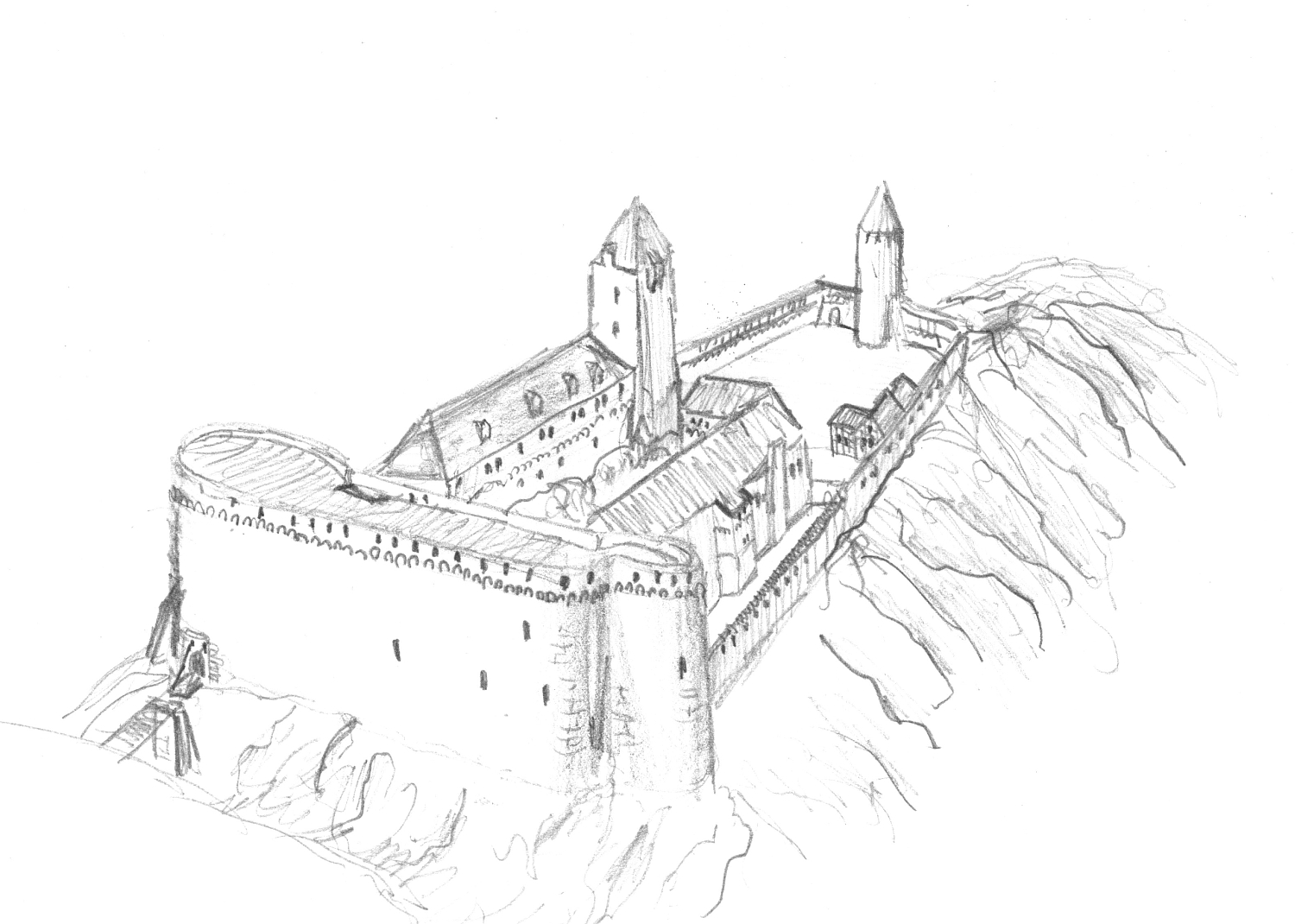 Burg Neuscharfeneck, eigenhändige Rekonstruktionszeichnung (frei nach Werner Meyer Deutsche Burgen Schlösser und Festungen)